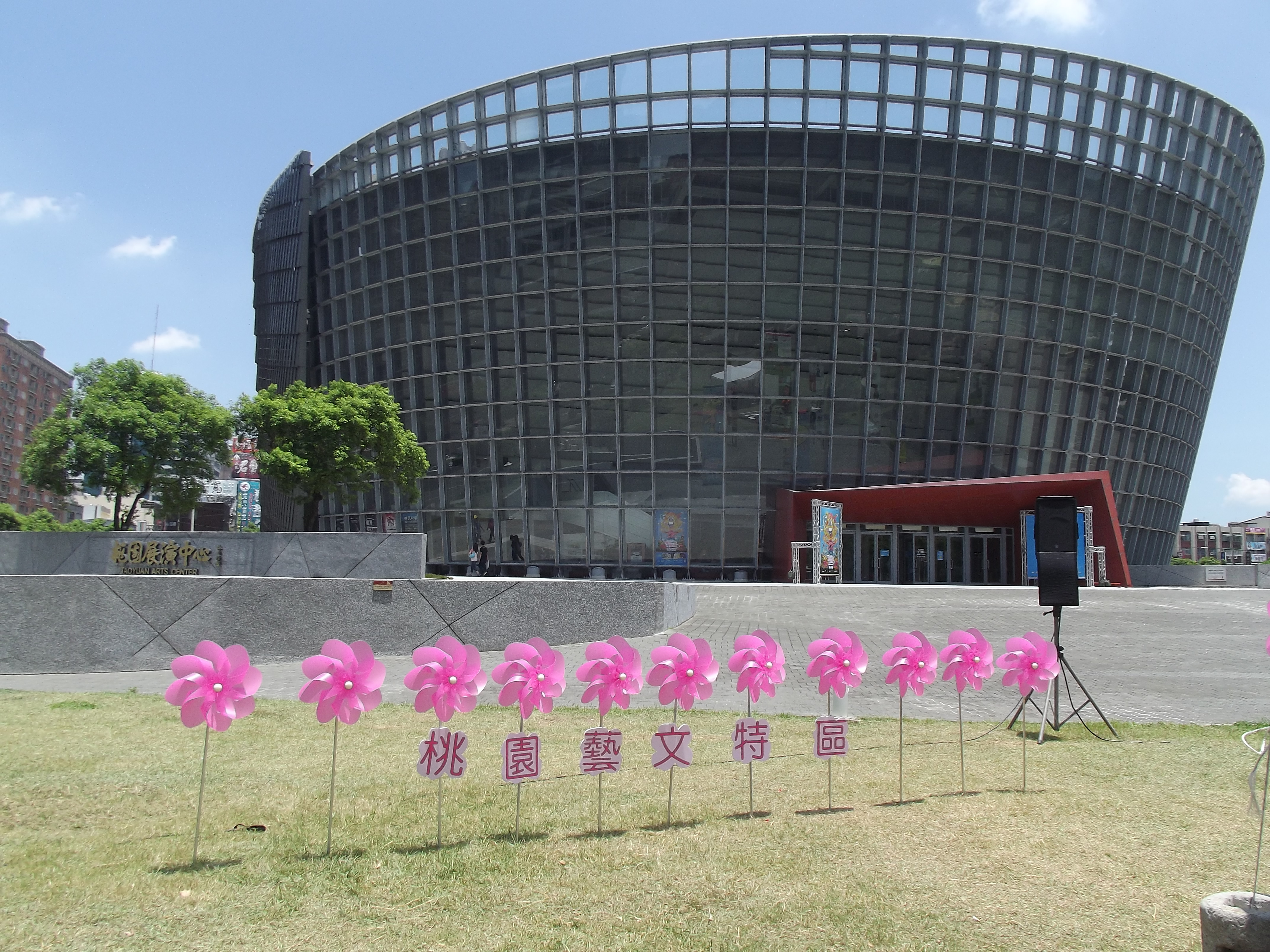 桃園縣展演中心，坐落於桃園藝文特區